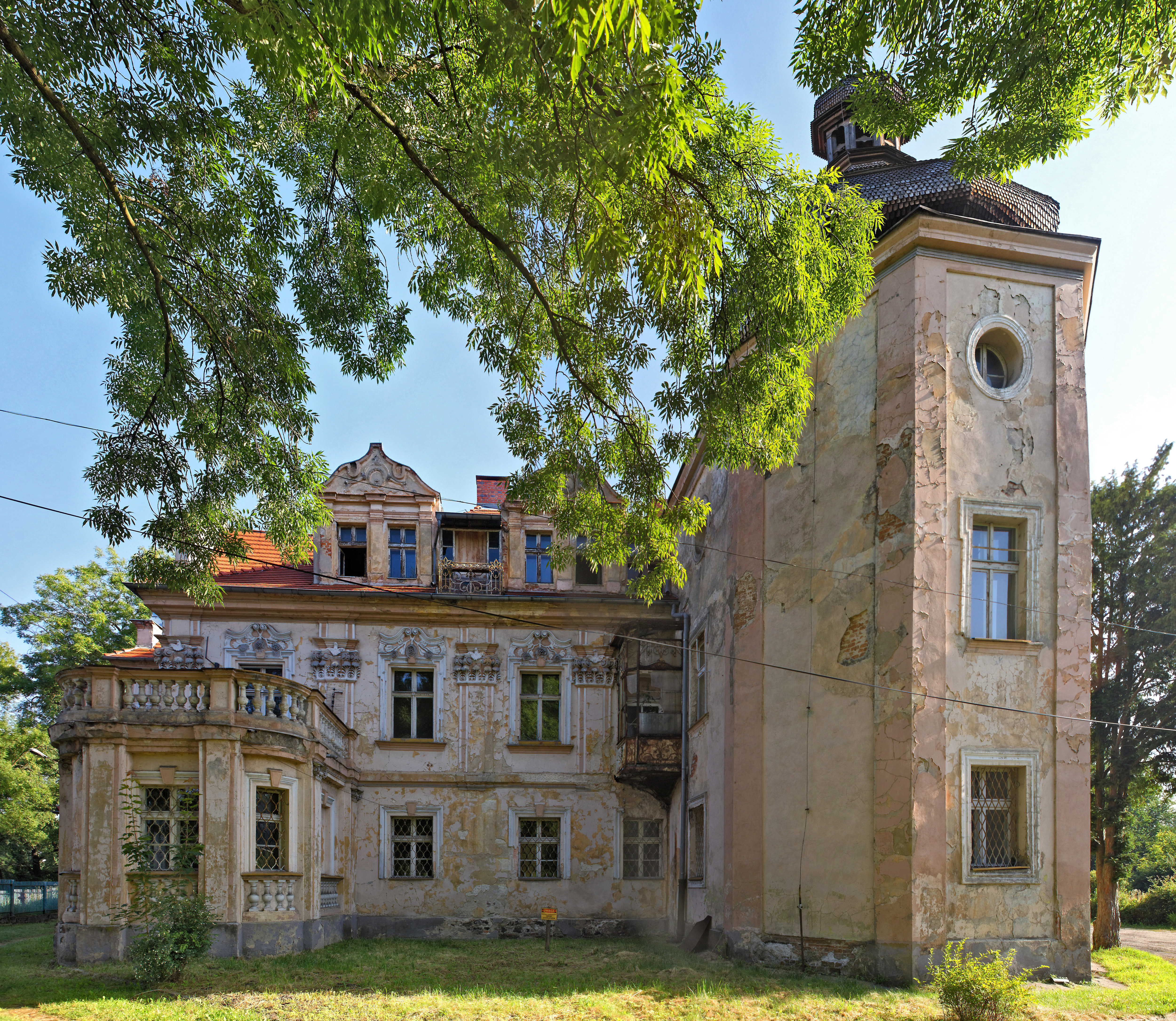 Turawa, ul. Opolska 40 - pałac, mur., 1728, 1751, 1760, 3 ćw XIX w., obecnie Dom Dziecka (zabytek nr 194/56 z 12.04.1956)